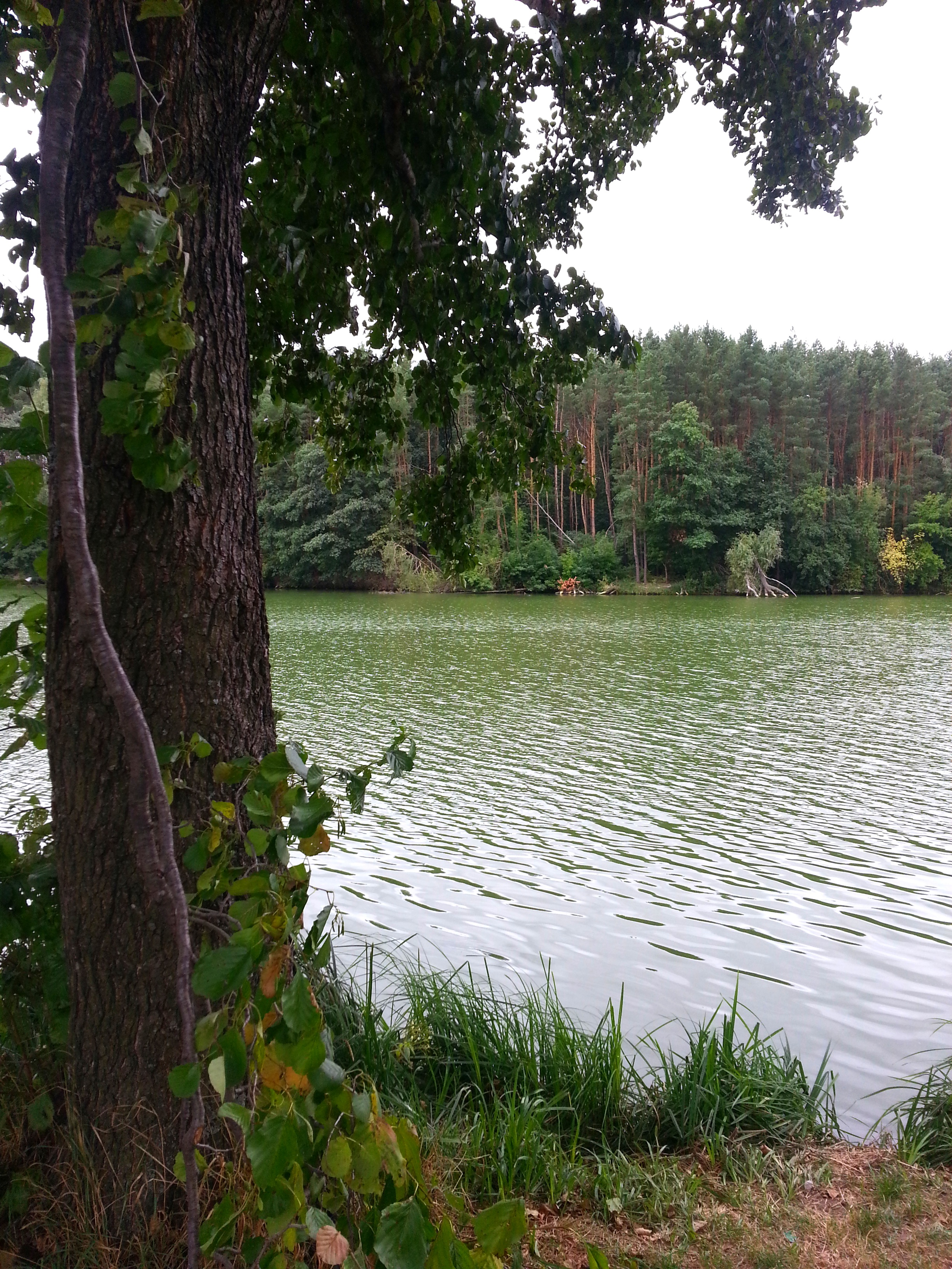 Урочище «Кончаки», Фастівський район, Дідівщинська сільська рада